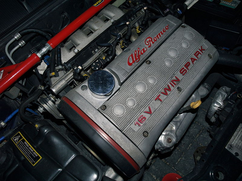 alfa blok, 4 cilinder 16valve